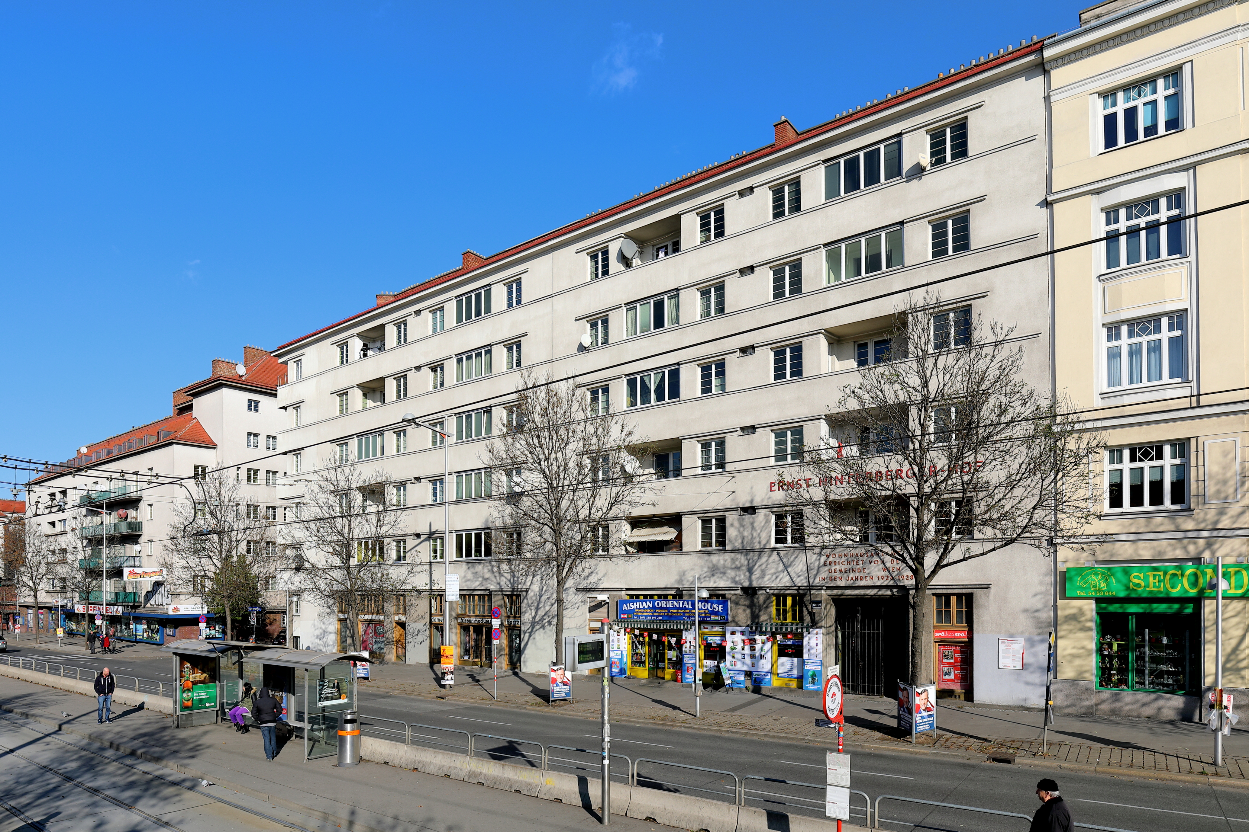 Der denkmalgeschützte Gemeindebau Ernst-Hinterberger-Hof an der Adresse Margaretengürtel 122-124 im 5. Wiener Bezirk Margareten.Die Wohnhausanlage mit den Adressen Margaretengürtel 122-124, Gießaufgasse 33-35 und Josef-Schwarz-Gasse 5-7 wurde in der 2. Hälfte der 1920er Jahre nach Plänen von Adolf Jelletz errichtet. Der Bau mit ursprünglich 116 Wohneinheiten hat einen U-förmigen Grundriss mit einem großzügigen Innenhof. Der zuerst „namenslose“ Gemeindebau wurde 2013 nach dem im Jahr 2012 verstorbenen Autor Ernst Hinterberger benannt.